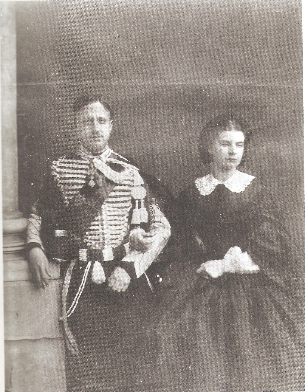 Francesco II delle Due Sicilie (1836-1894) e sua moglie Maria Sofia di Baviera (1841-1925)